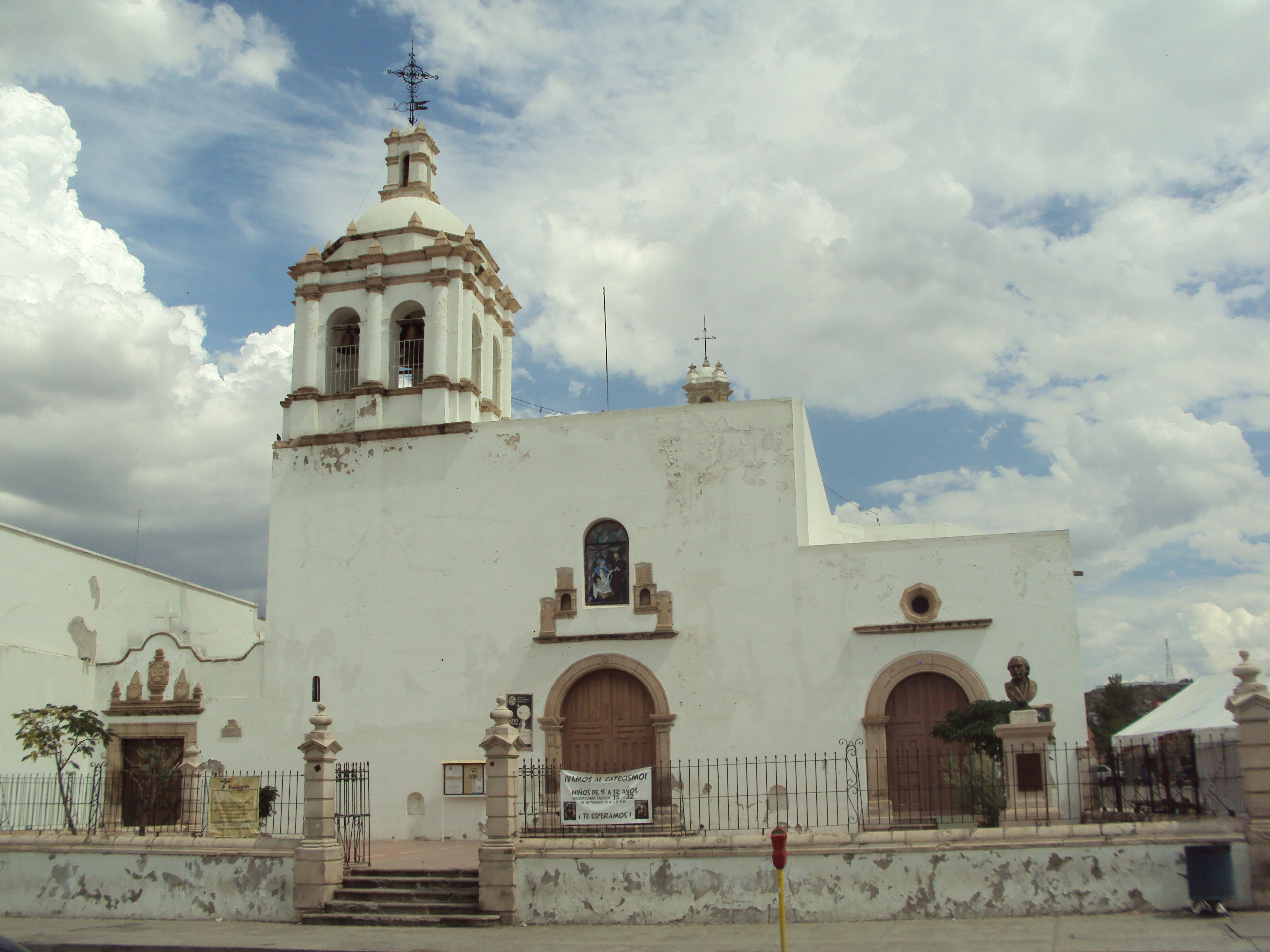 Templo de San Francisco en la ciudad de Chihahua, Chihuahua